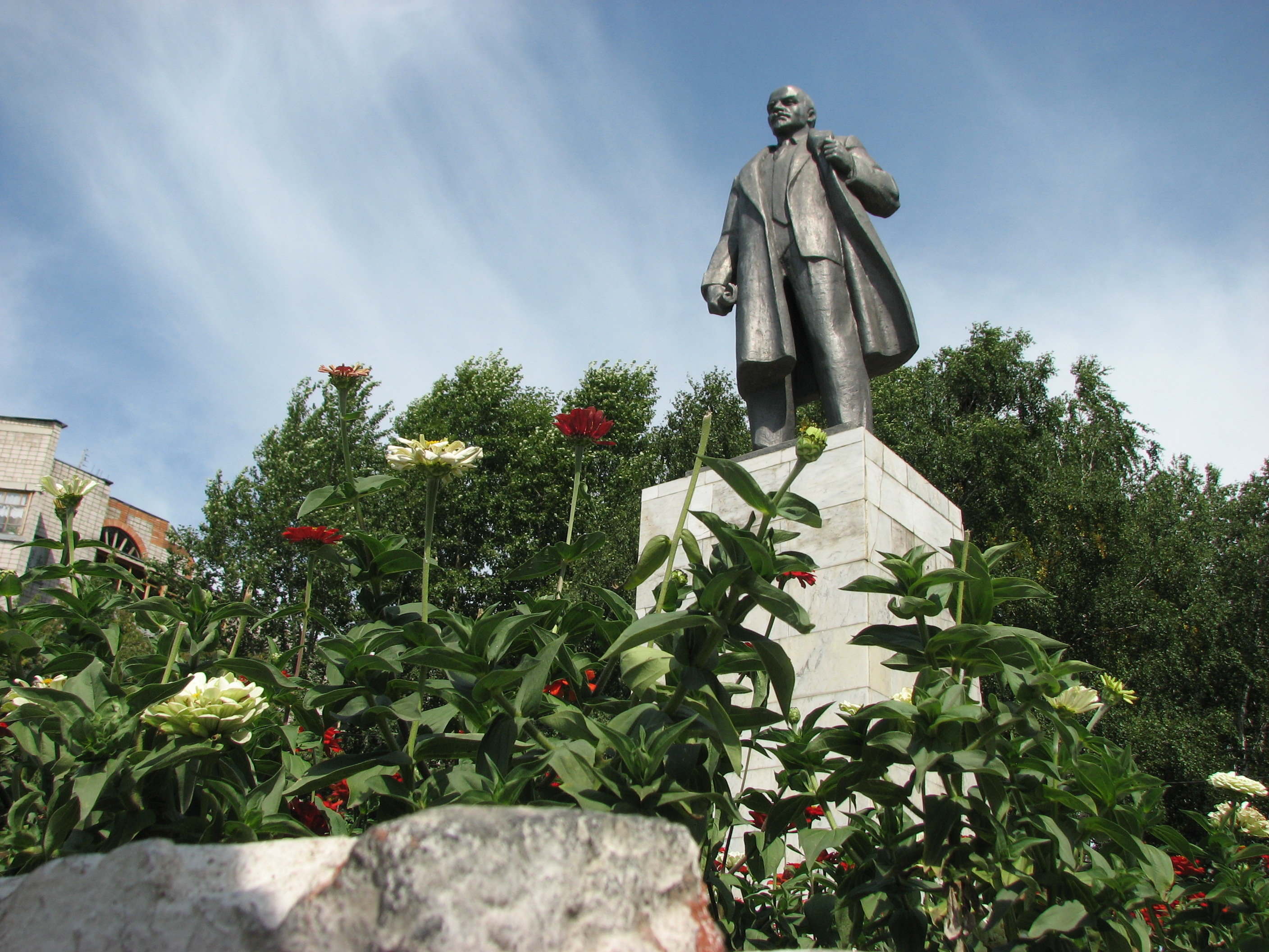 Памятник В.И. Ленину в г. Белорецке. Фото сделано в 2008 году